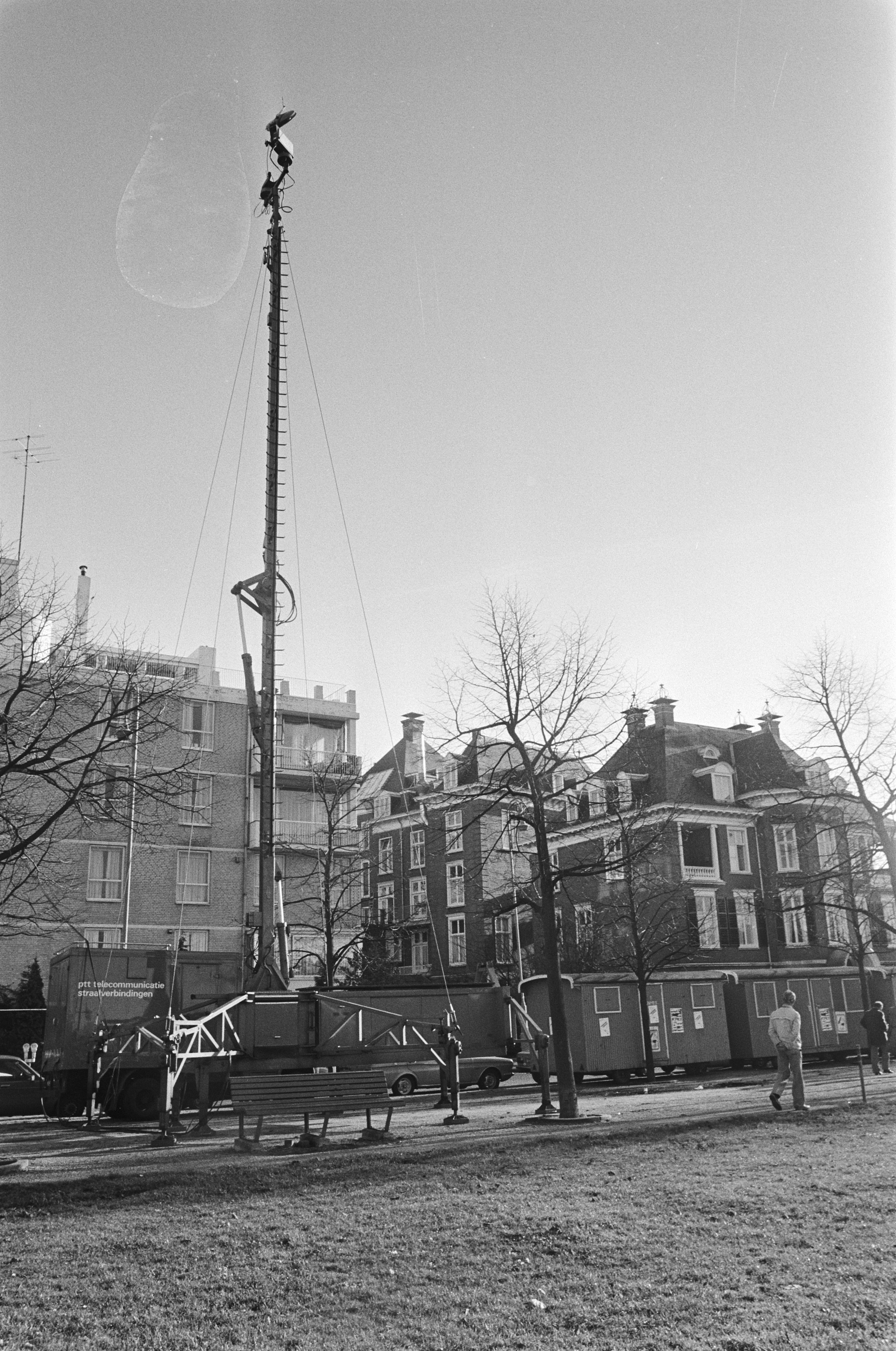 Collectie / Archief : Fotocollectie Anefo Reportage / Serie : Museumplein in Amsterdam wordt in gereedheid gebracht voor de vredesdemonstratie aanstaande zaterdag Beschrijving : Mobiele toiletten en een PTT-straalzender op het Museumplein Datum : 19 november 1981 Locatie : Amsterdam, Noord-Holland Trefwoorden : sanitaire voorzieningen, straalzenders Fotograaf : [onbekend] Auteursrechthebbende : Nationaal Archief Materiaalsoort : Negatief (zwart/wit) Nummer archiefinventaris : bekijk toegang 2.24.01.05 Bestanddeelnummer : 931-8120